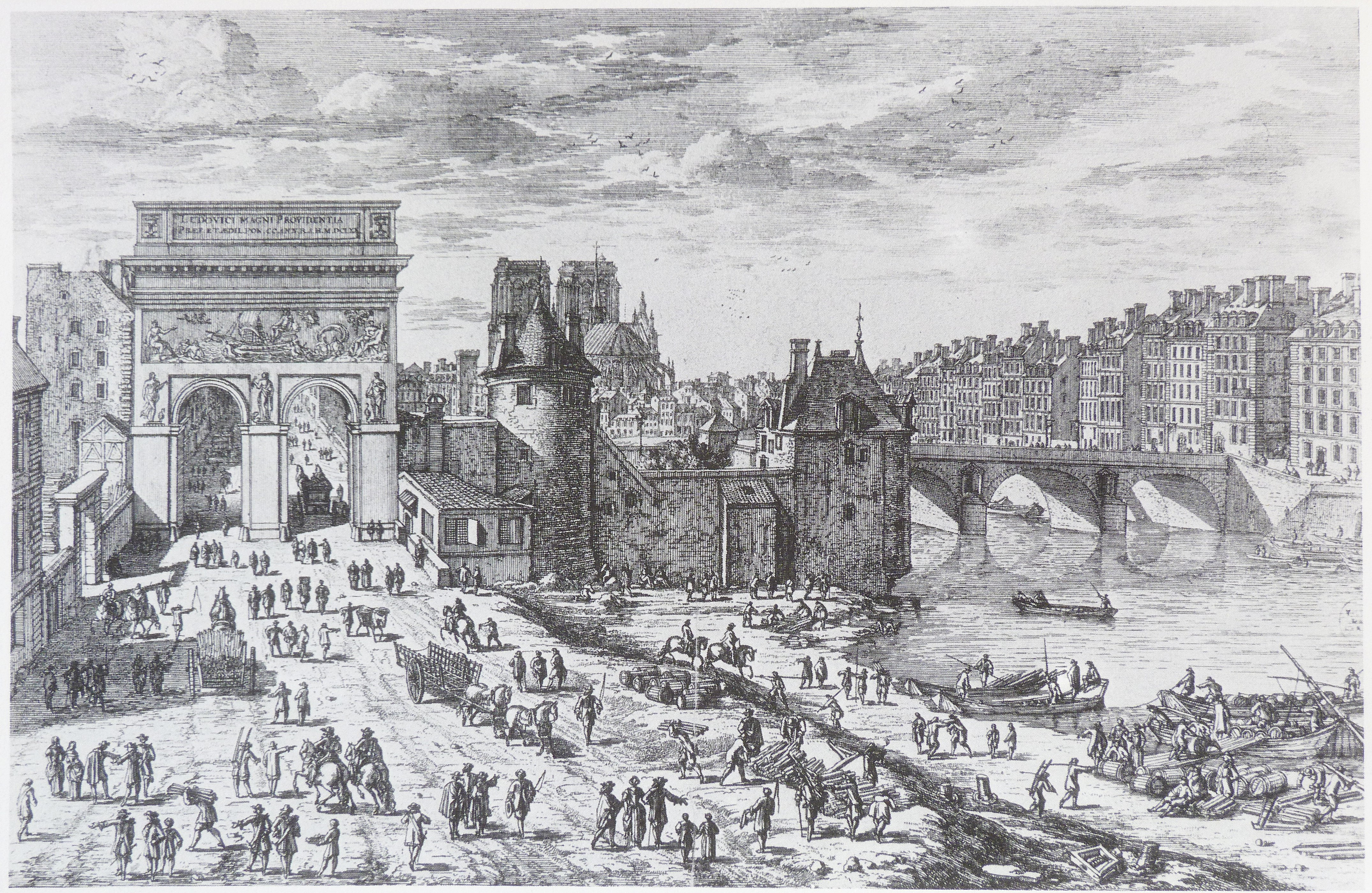 Gravure d'Adam Pérelle (1638-1695) - La Porte Saint-Bernard, publiée par Nicolas Langlois (1640-1703)- Dimensions originales 17,9 x 27,4 cm - Topo. P.C. 75 F.